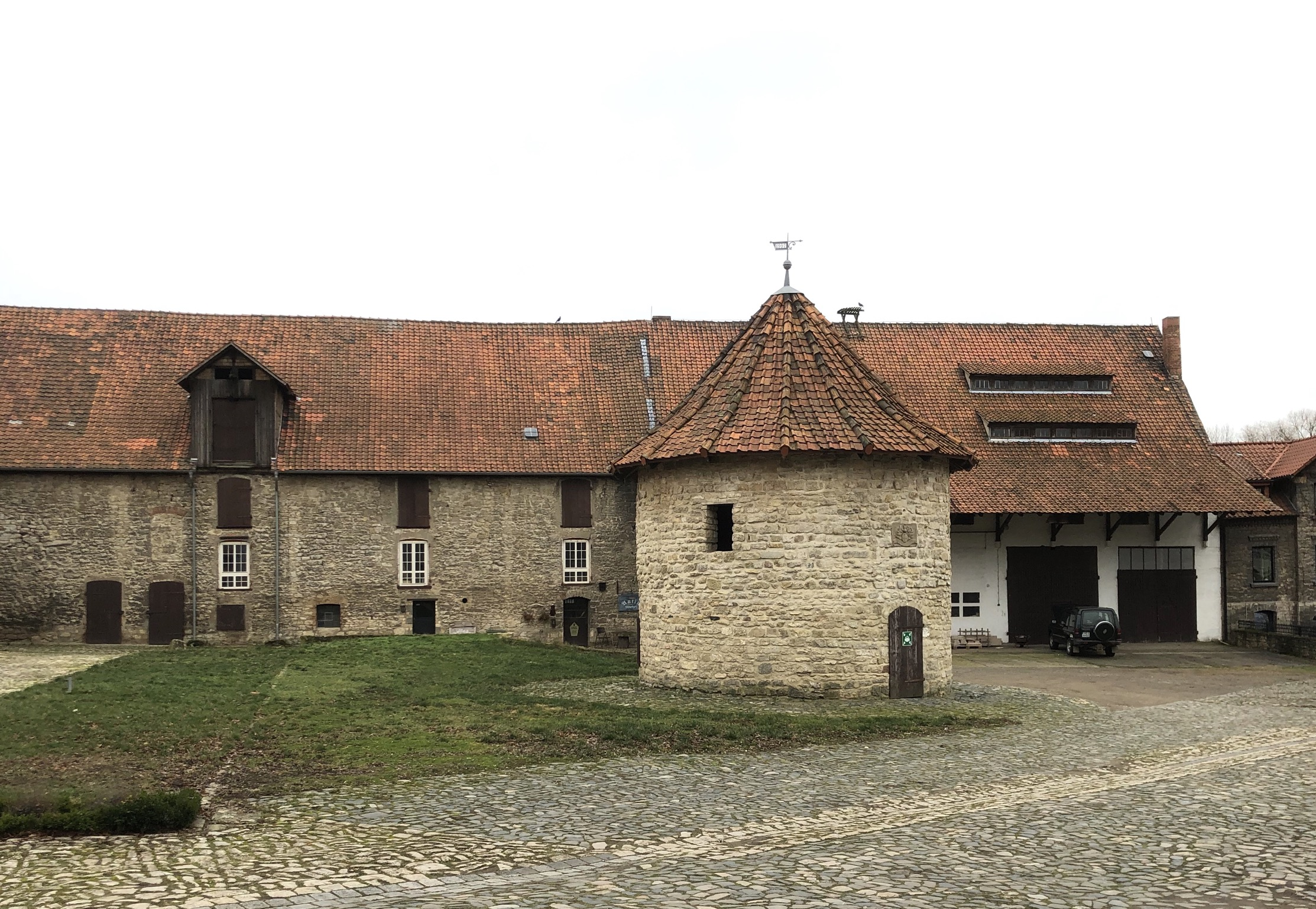 Kloster Hedersleben